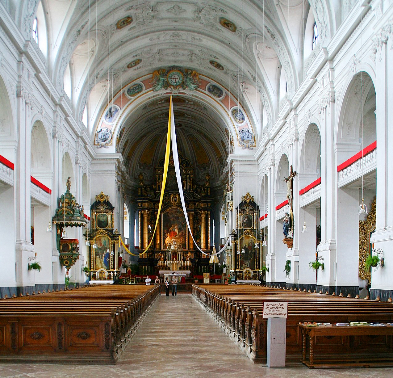 Basilika minor St. Anna im Wallfahrtsort Altötting (Landkreis Altötting, Oberbayern). Blick durch Langhaus zum Chor mit Hochaltar. St. Anna wurde als neobarocker Bau 1910-12 errichtet.